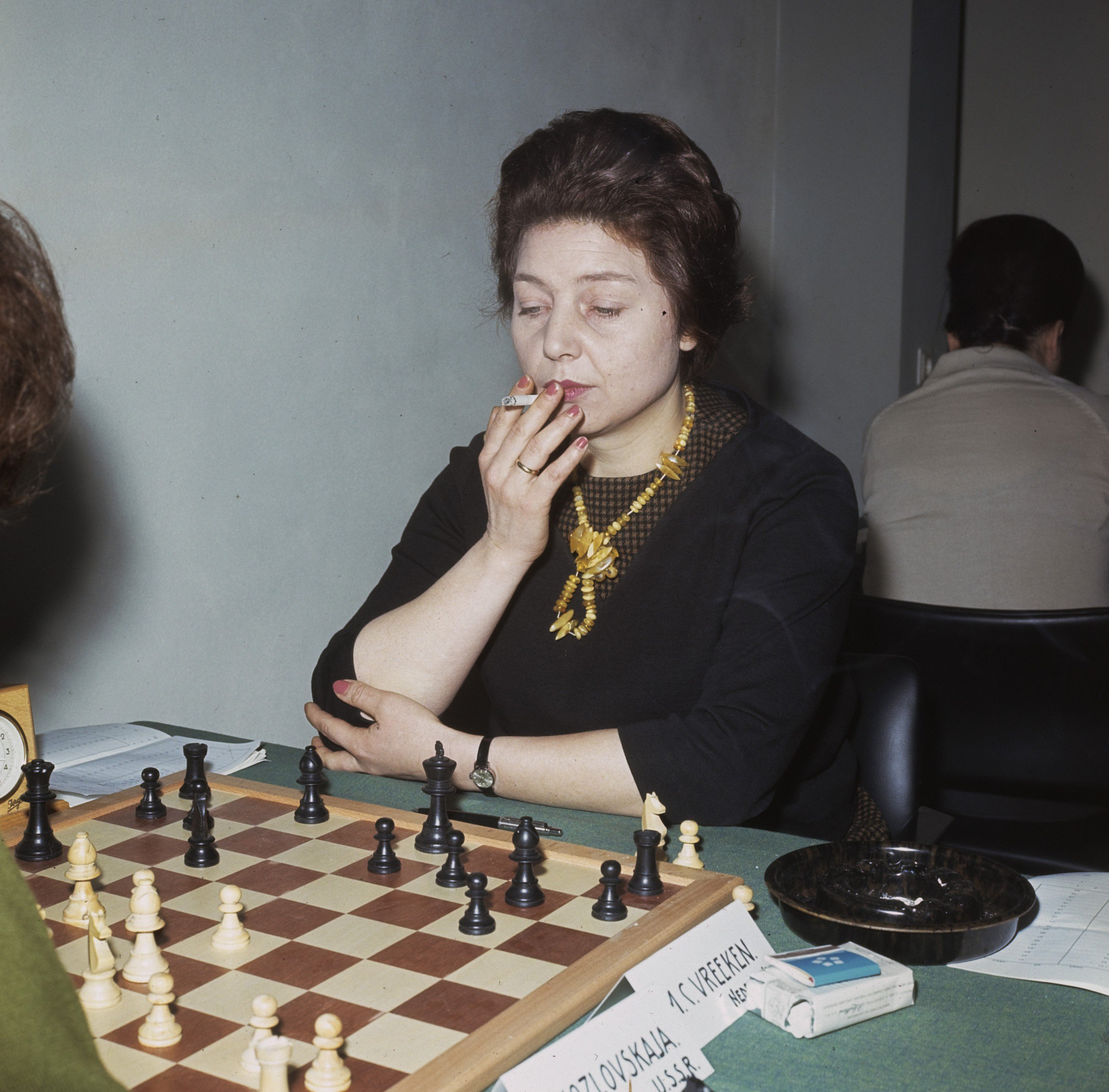 Hoogovenschaaktoernooi te Beverwijk; mevrouw Vreeken, Nederland